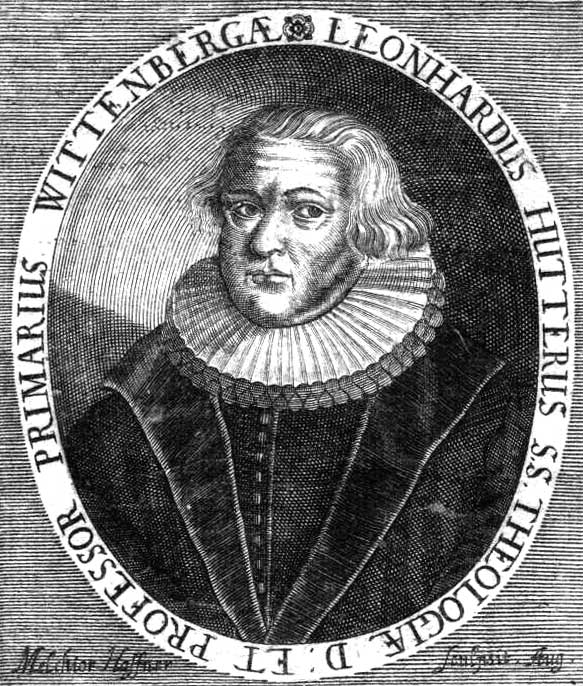 Leonhard Hutter, deutscher evangelischer Theologe. Kupferstich